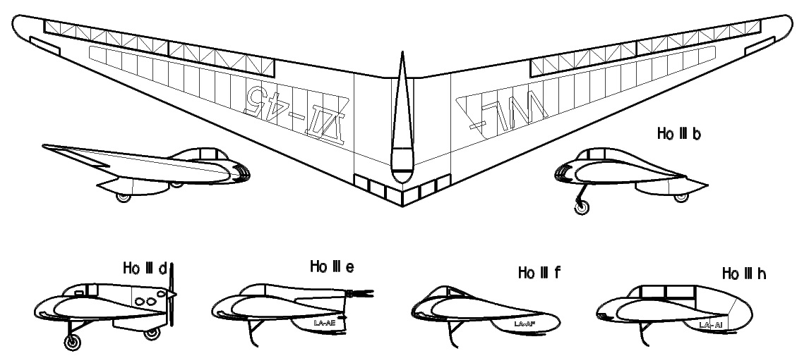 Horten H III Variants